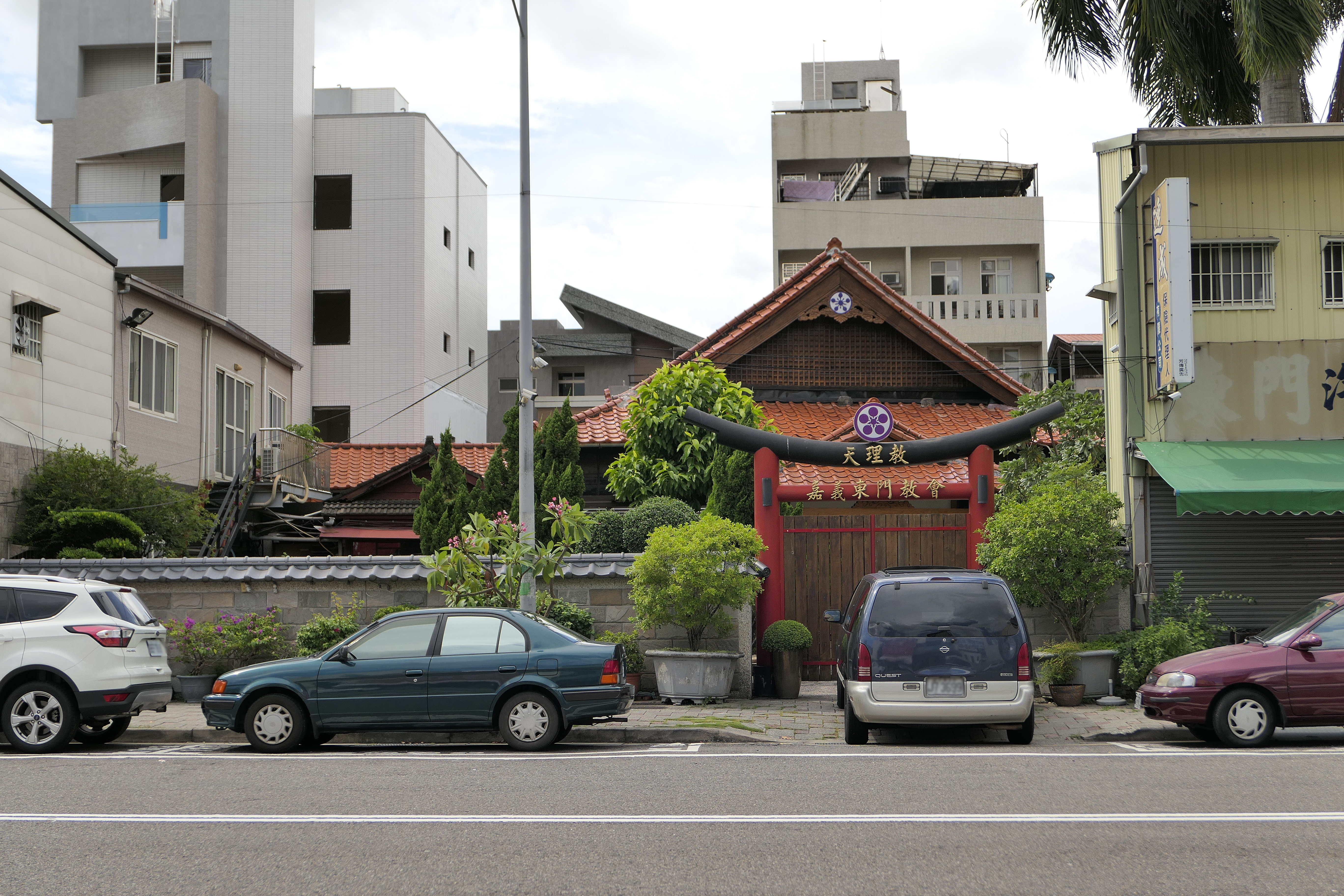 中文（台灣）: 天理教嘉義東門教會